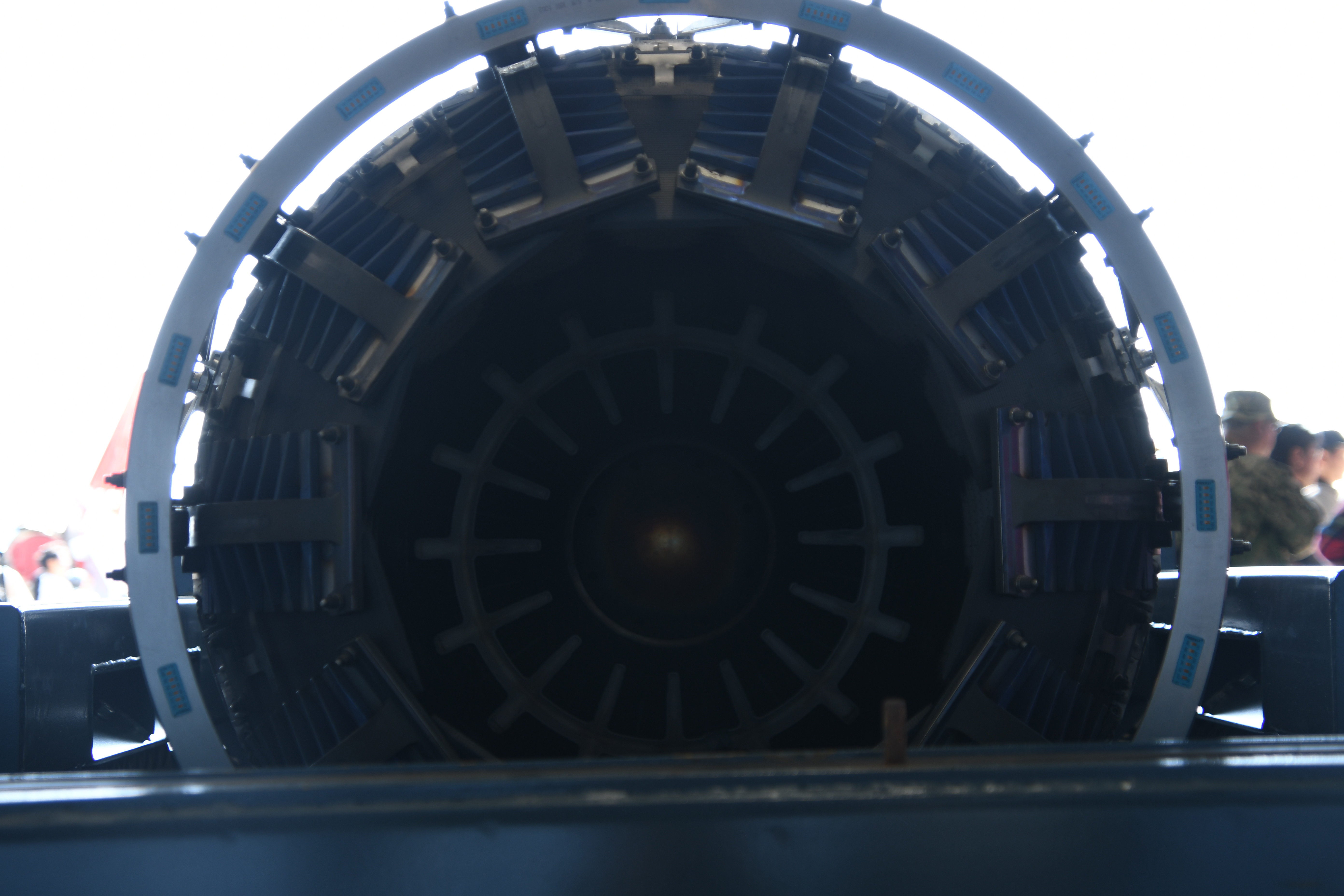 石川島播磨重工業（現：IHI） XF5-1ターボファン・エンジン アフターバーナー内部。2019年11月10日 航空自衛隊岐阜基地にて。